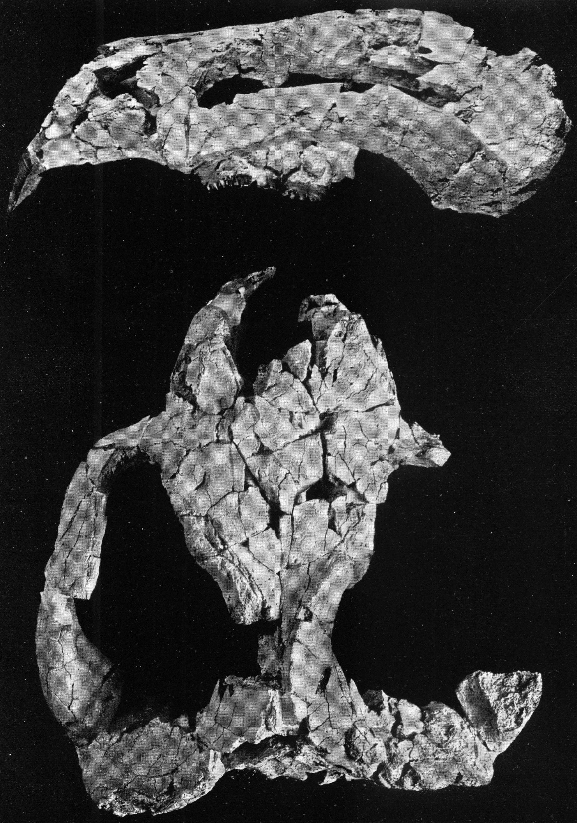 Taeniolabis taoensis skull, Am. Mus. 16321.